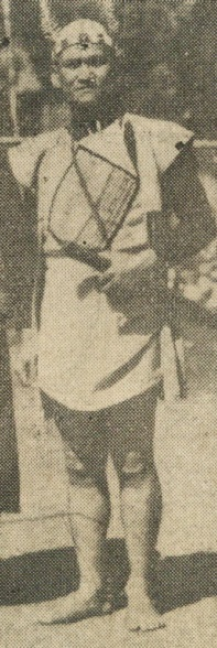 毛信孝（1905年－1989年1月30日），臺灣南投縣魚池鄉日月村邵族石印社人，以「毛王爺」之稱聞名，帶動日月潭觀光業。